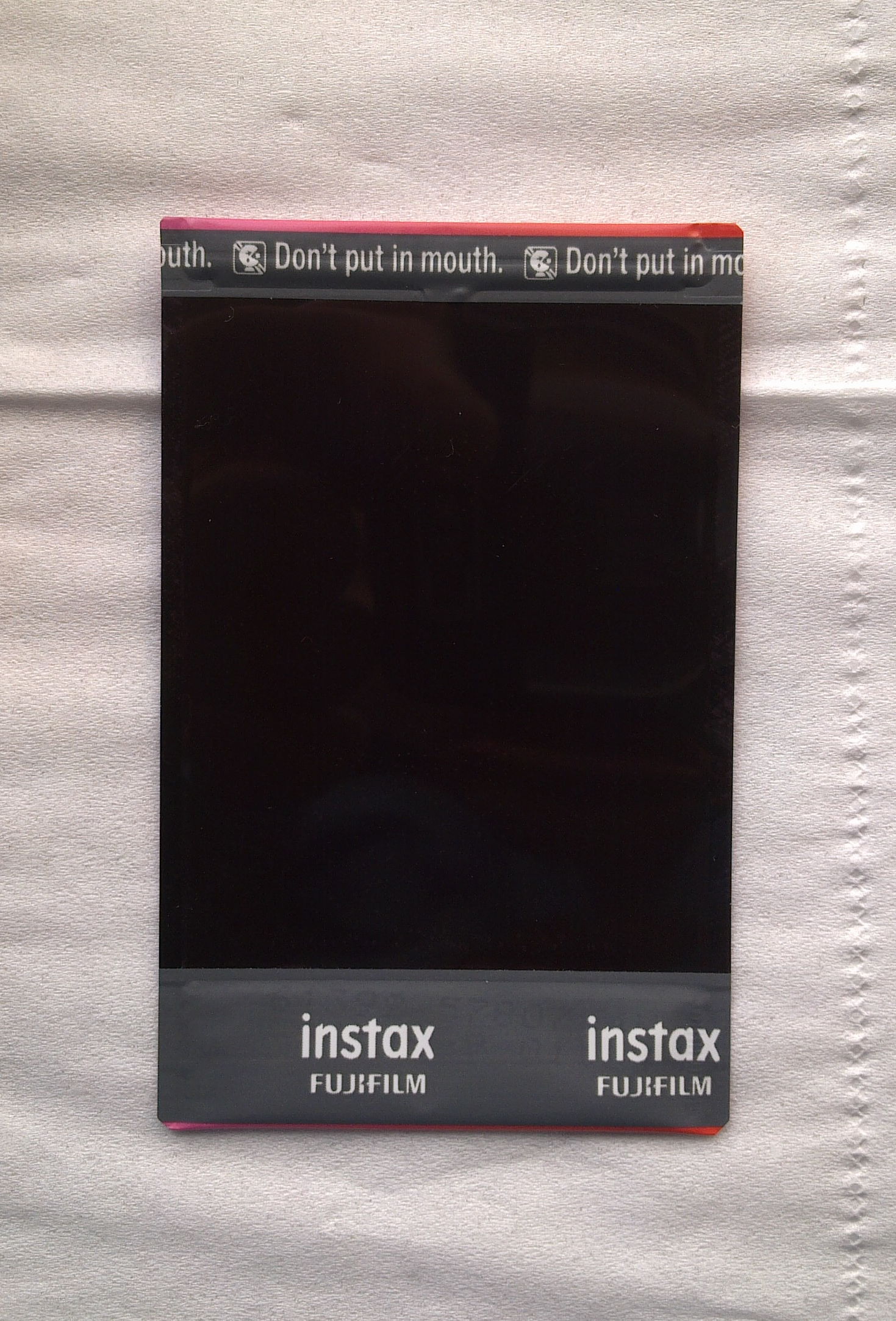 一张富士胶片instax mini即时底片（彩虹型）的背面，已显影，背部含有隐藏的药包